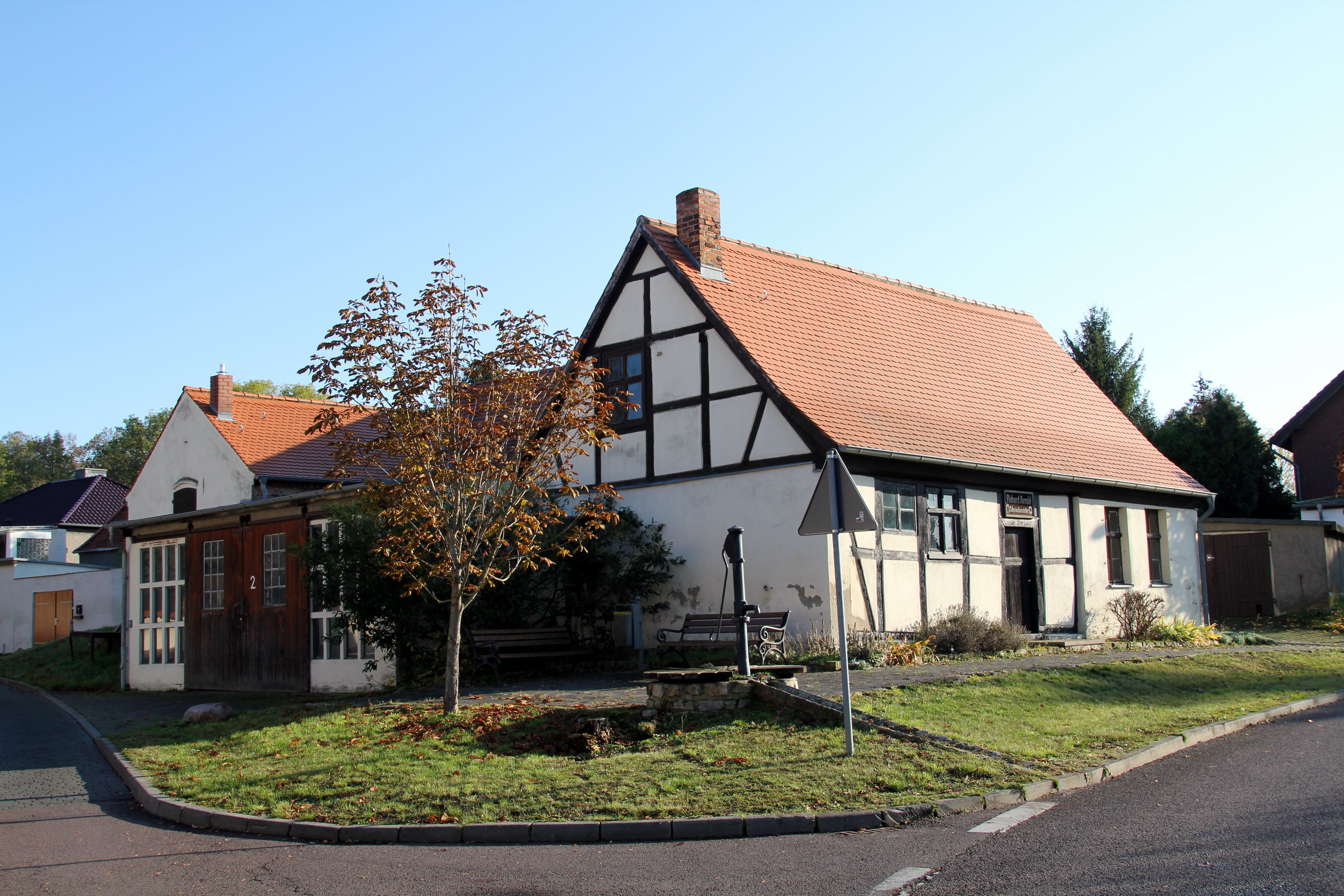 Schmiede Hinter der Kirche 2 Klein Rodensleben